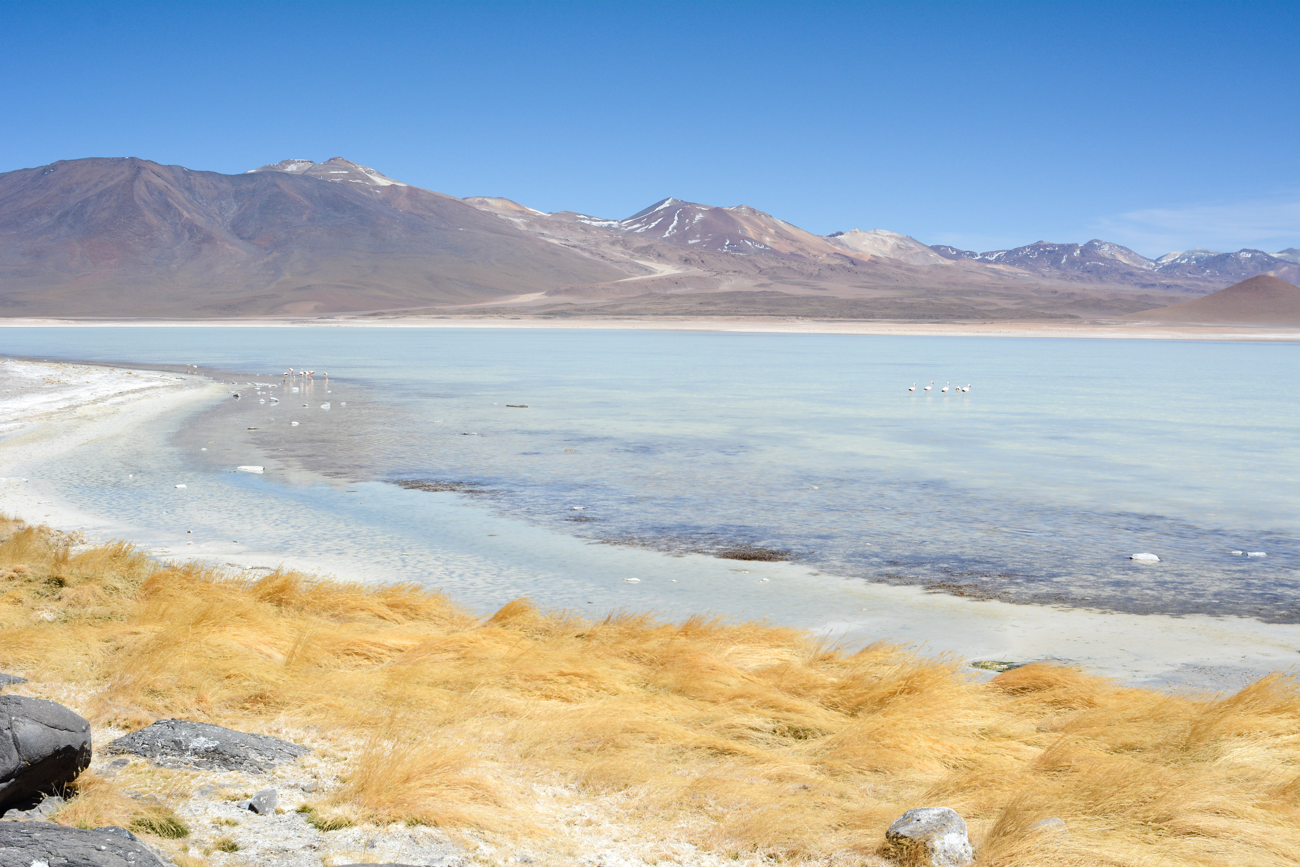 Altiplano, Bolivien